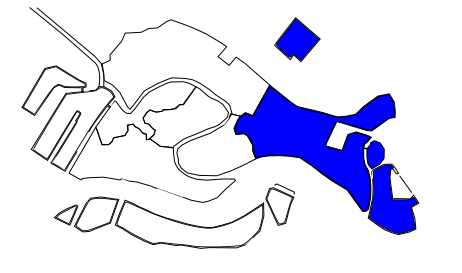 Sestiere di Castello a Venezia